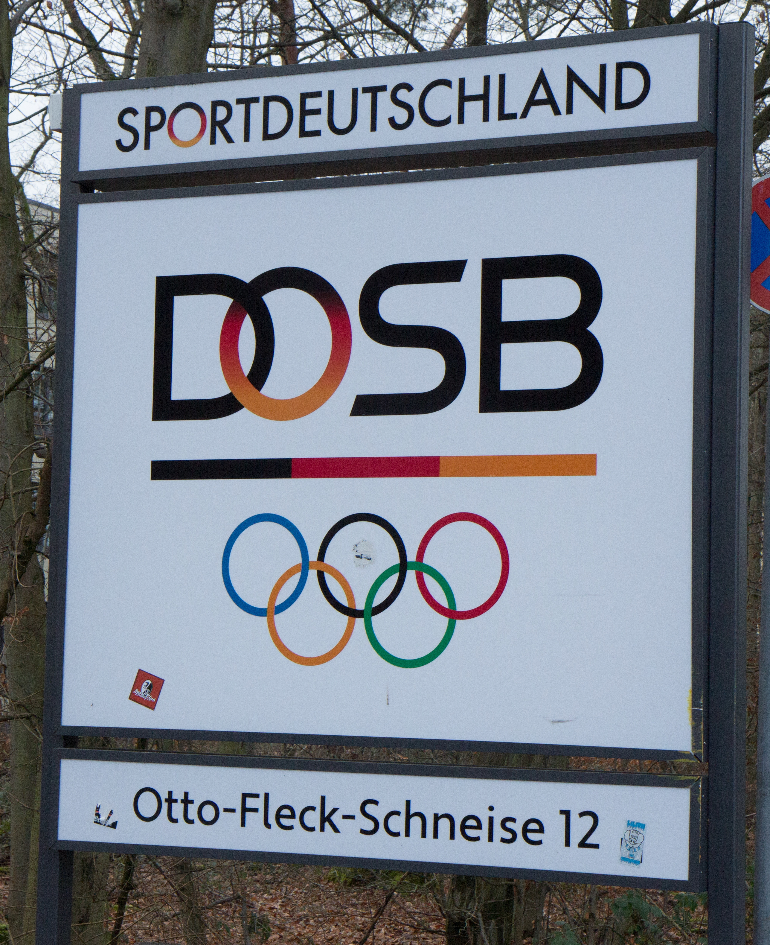 Eingang zum DOSB in Frankfurt/Main